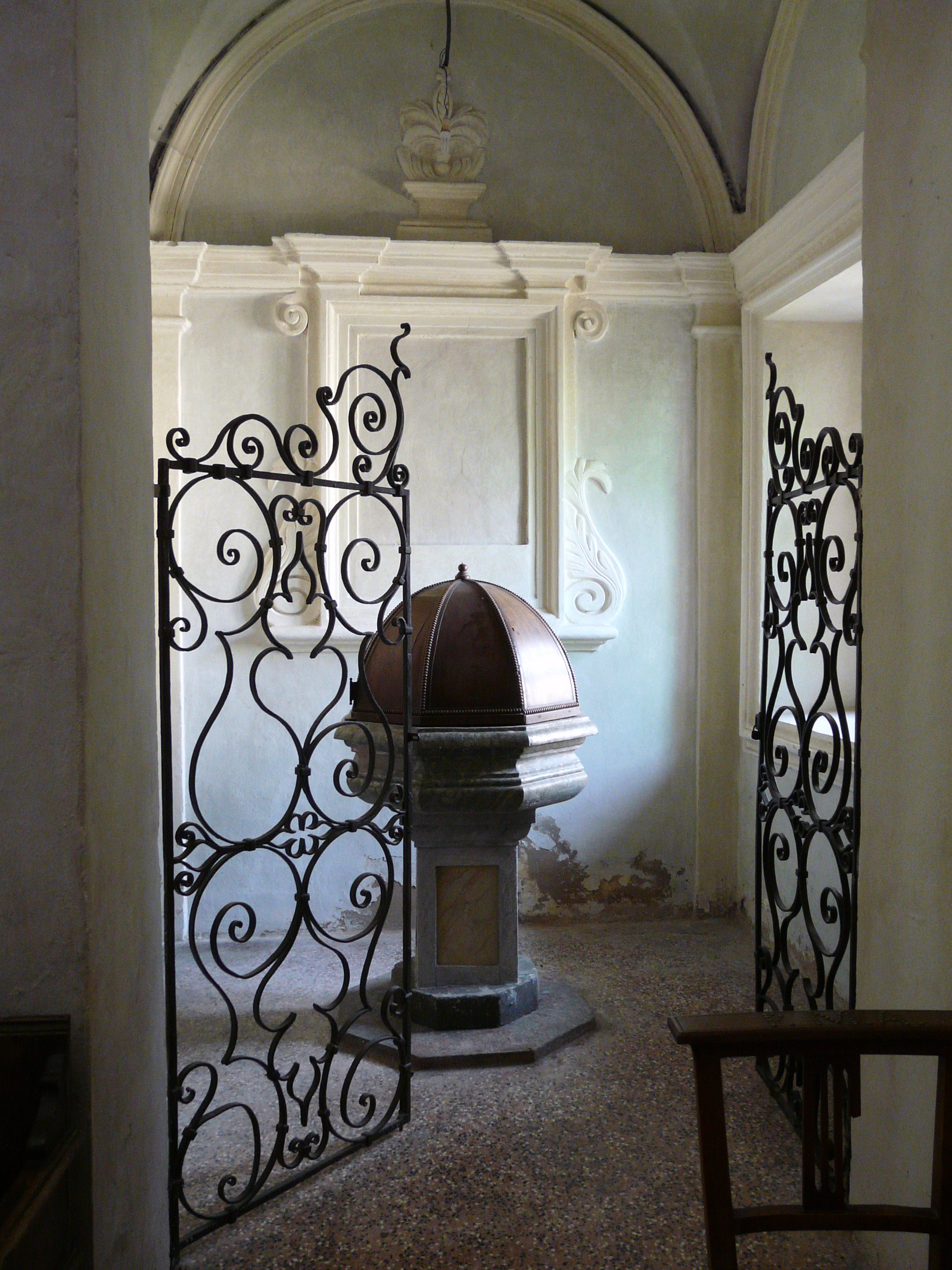 Il fonte battesimale della pieve di Santa Maria, Castelnovo ne' Monti, Emilia-Romagna, Italia